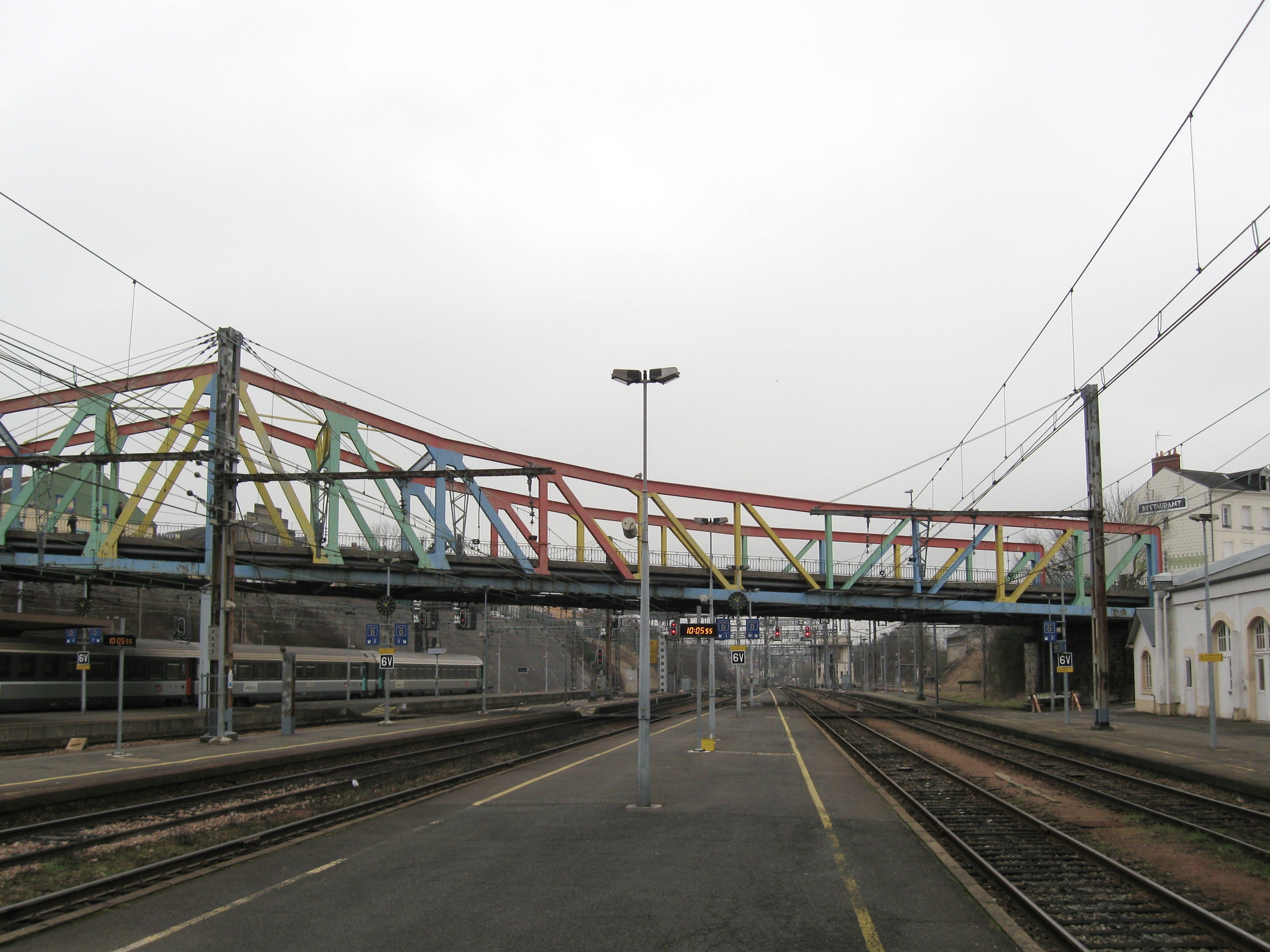 Quais et voies en direction de Limoges, gare de Vierzon-Ville, Vierzon, Cher, France